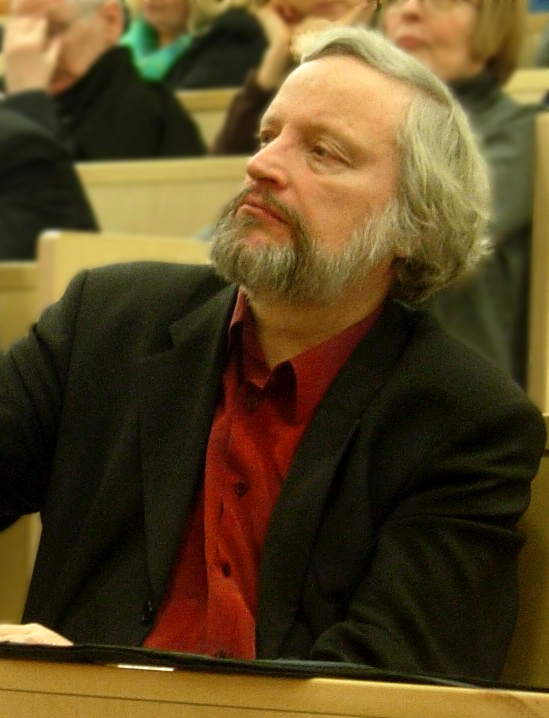 Ilkka Niiniluoto kuuntelee Tieteen päivillä väittelyä sivilisaatioiden yhteentörmäyksestä 13.1.2007 Helsingin yliopiston päärakennuksen salissa 1.